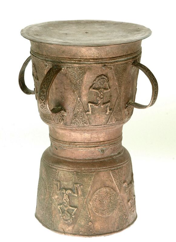 Ruilmiddel. Zandlopervormige trom van brons Unknown language: Mokko